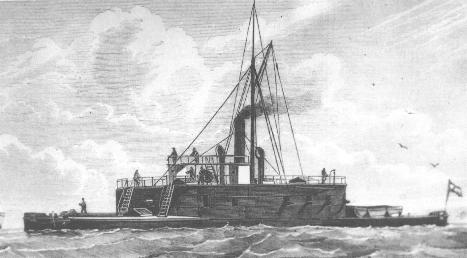 Grabado de 1880 de la batería flotante Duque de Tetuán, de la Armada Española